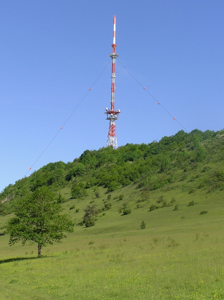 Fernsehturm auf dem Hesselberg Fotograf: Oswald Engelhardt